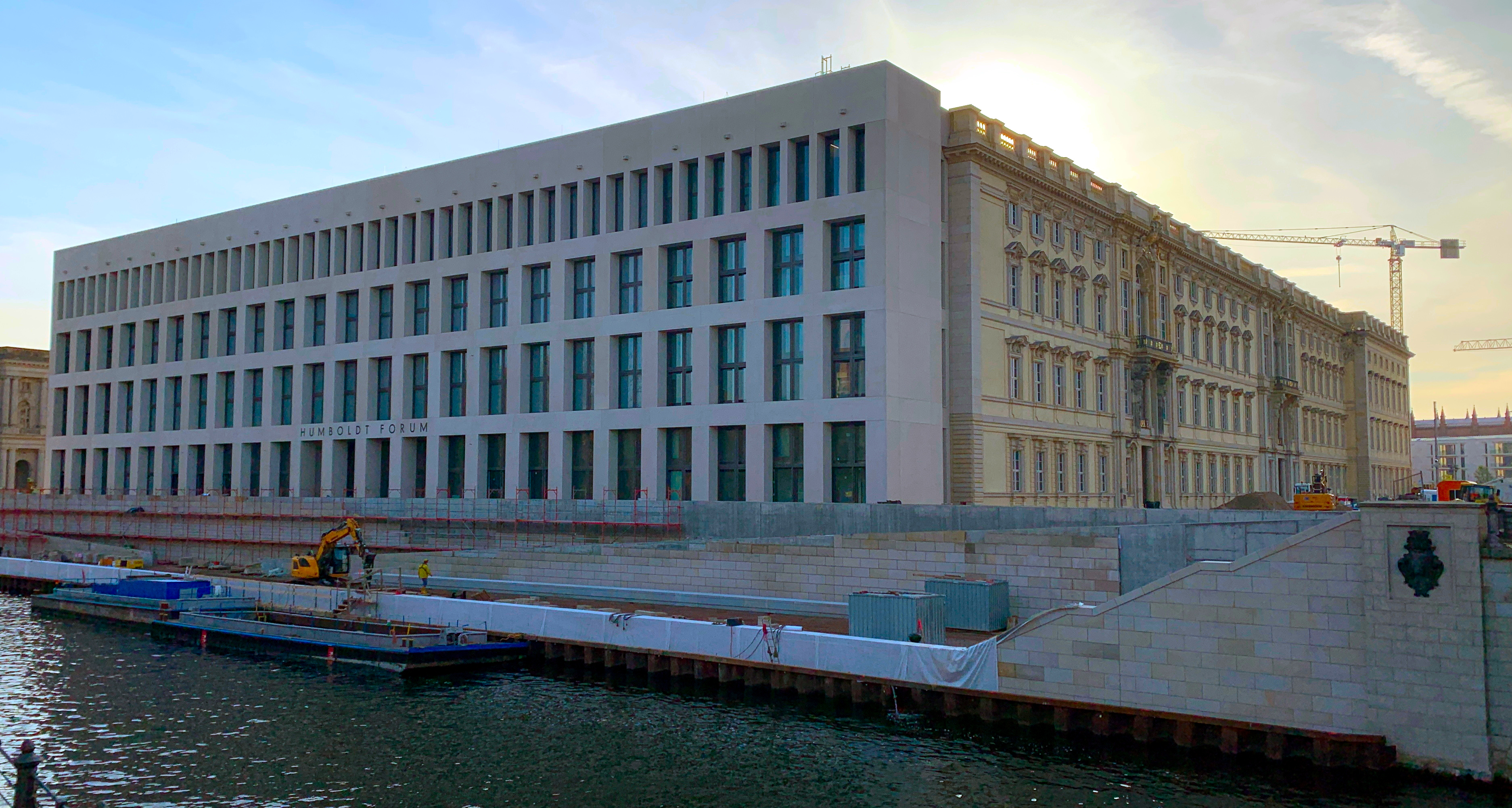 Humboldt Forum, Nord- und Ostfassade des Berliner Schlosses (November 2019)